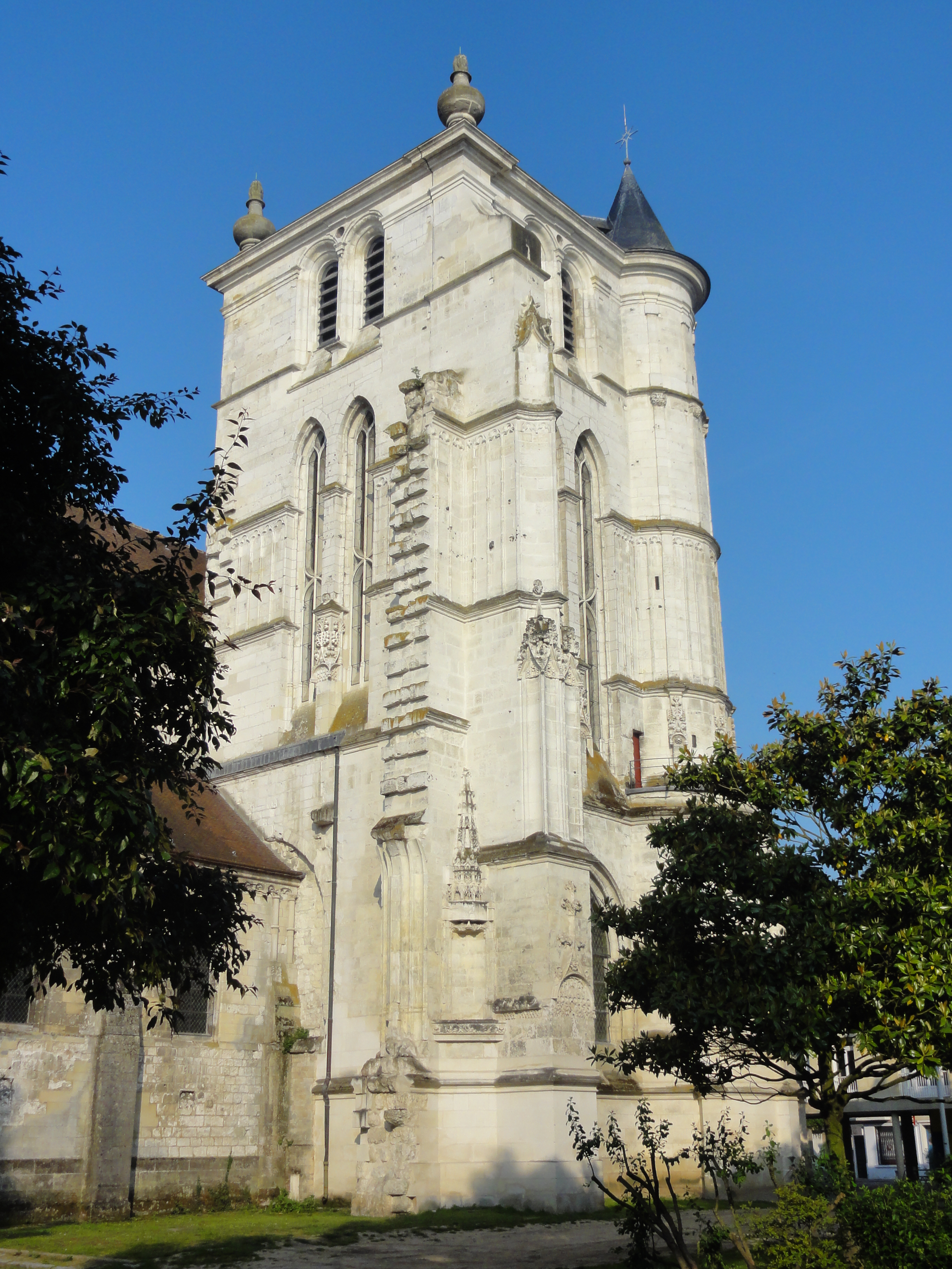 Clocher, vue depuis le nord-est.